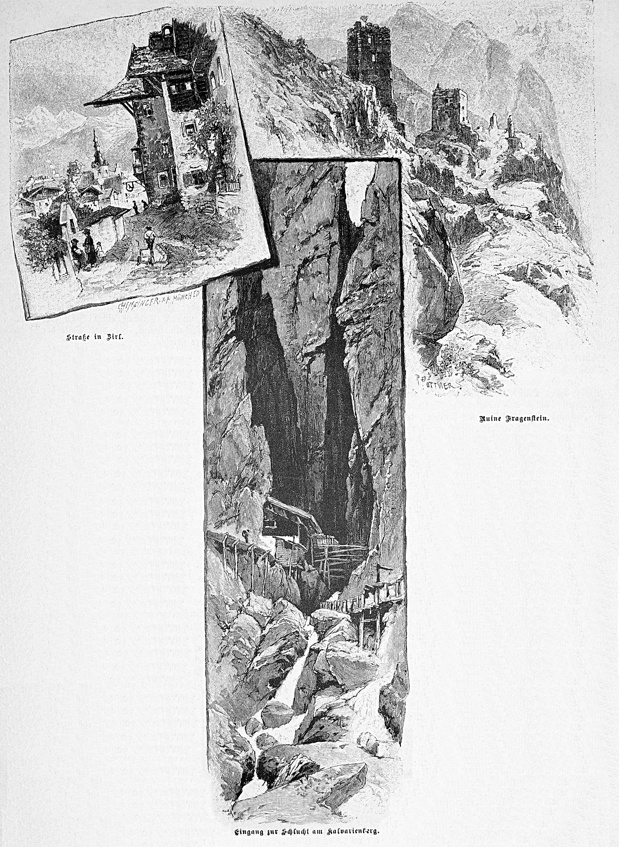 Bild aus Seite 872 in "Die Gartenlaube". Image from page 872 of journal Die Gartenlaube, 1887.